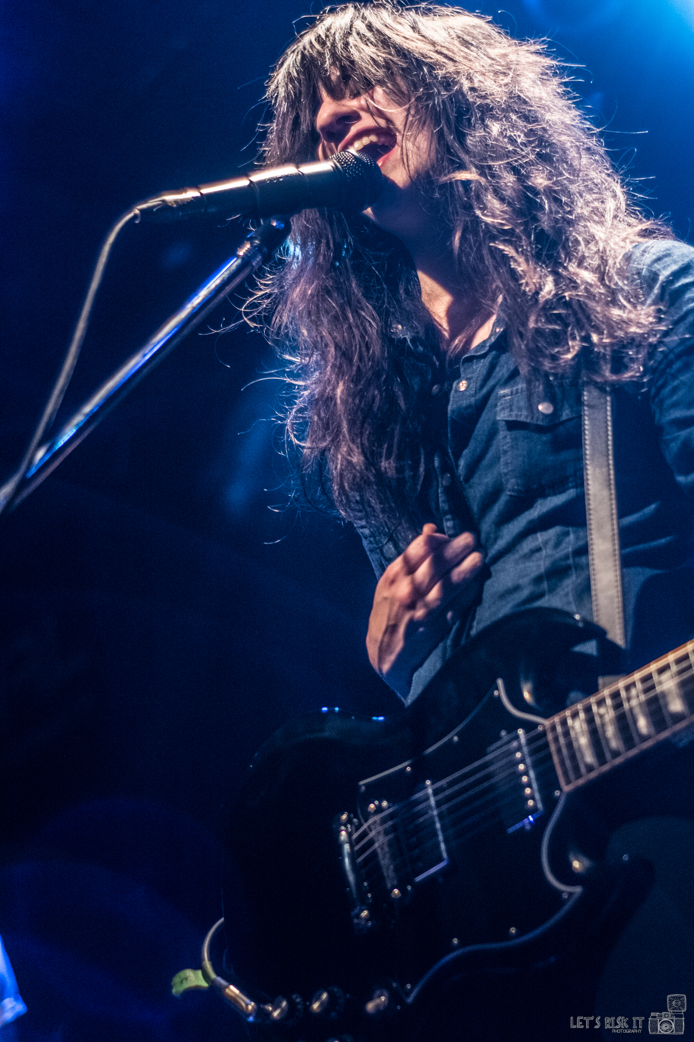 La cantante argentina, Marilina Bertoldi, lider de Connor Questa en vivo en 2014.